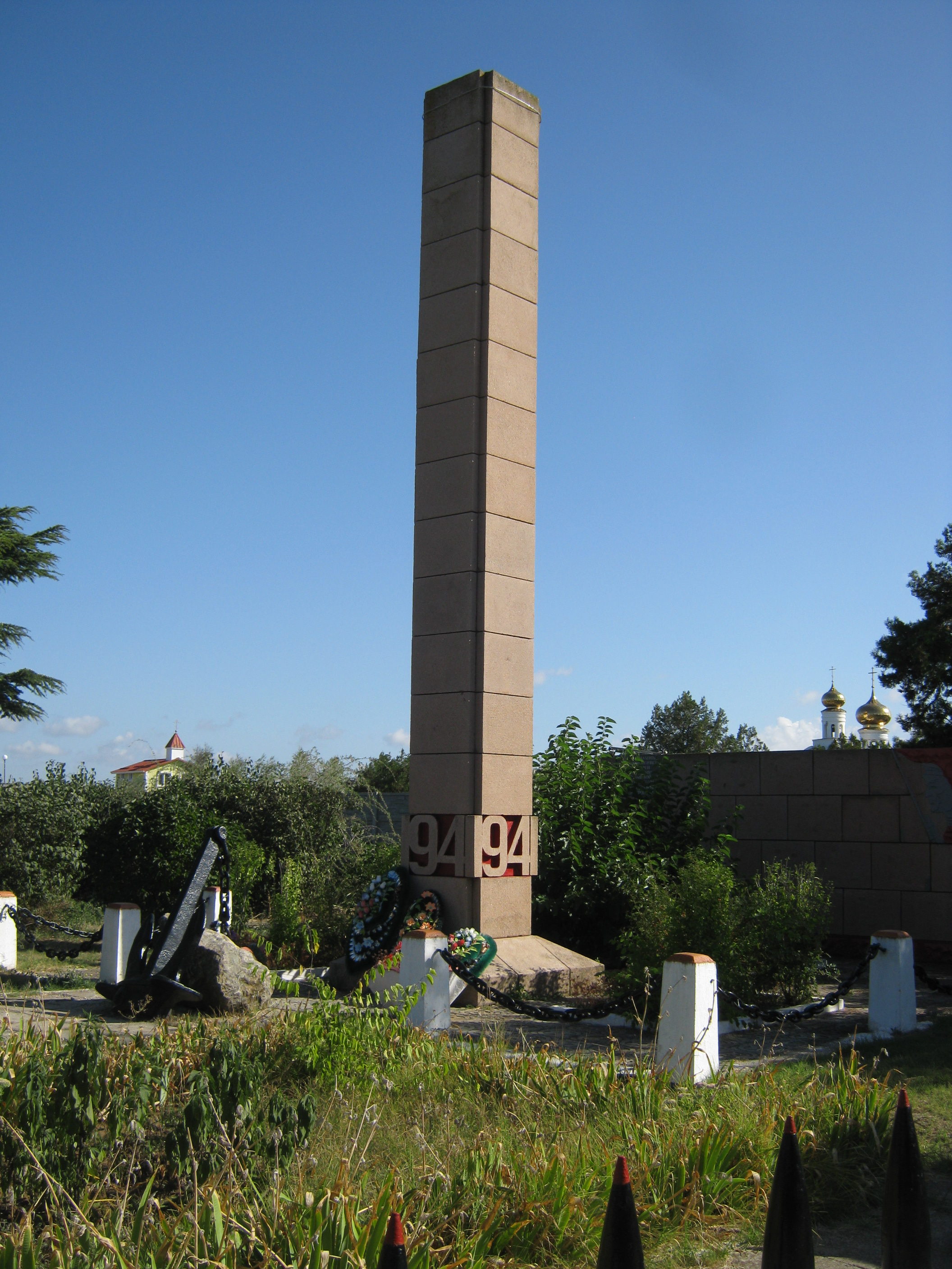 Мемориал героям 54-й береговой батареи (Николаевка, Крым) 2